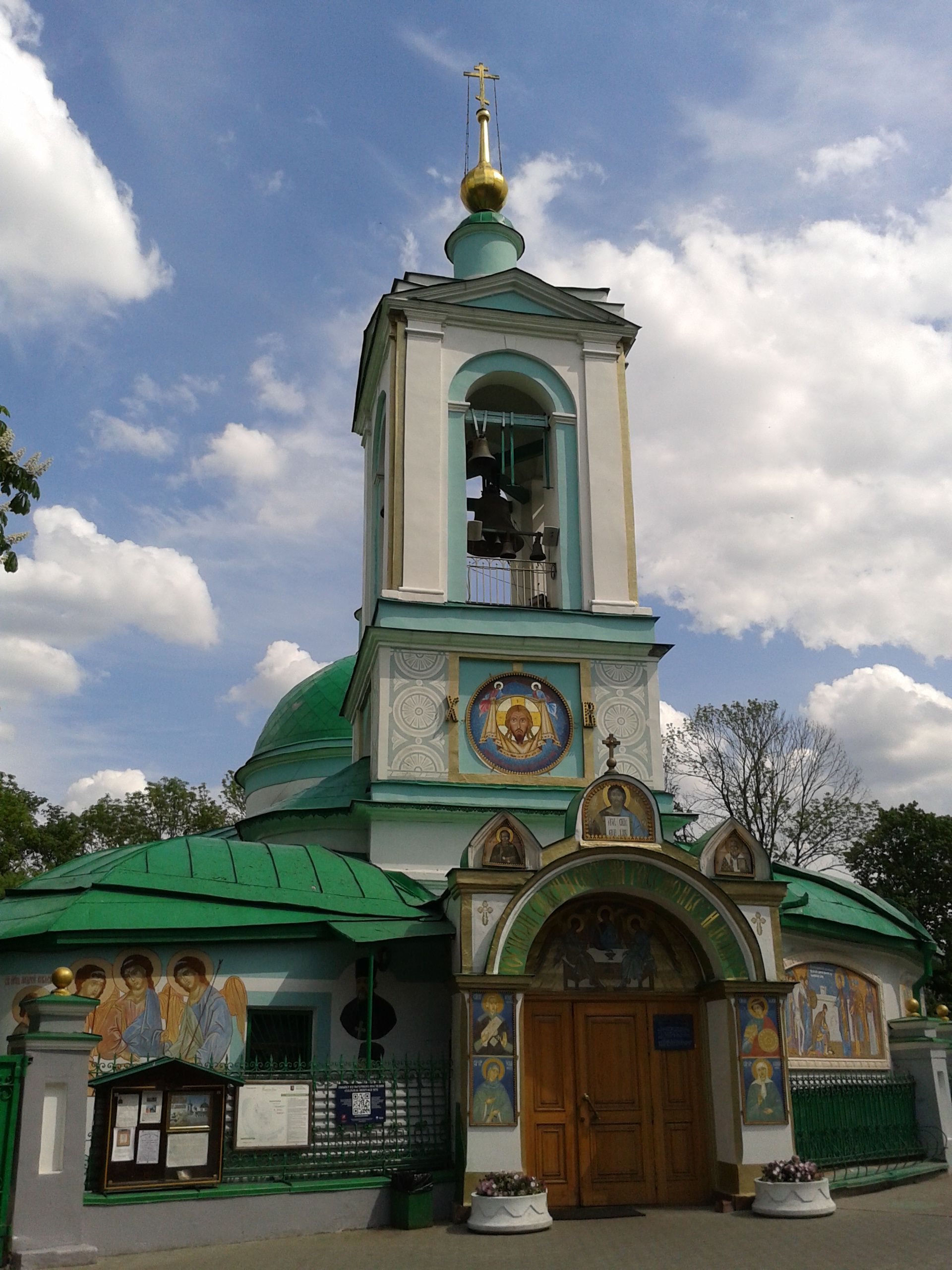 Храм Троицы на Воробьёвых горах